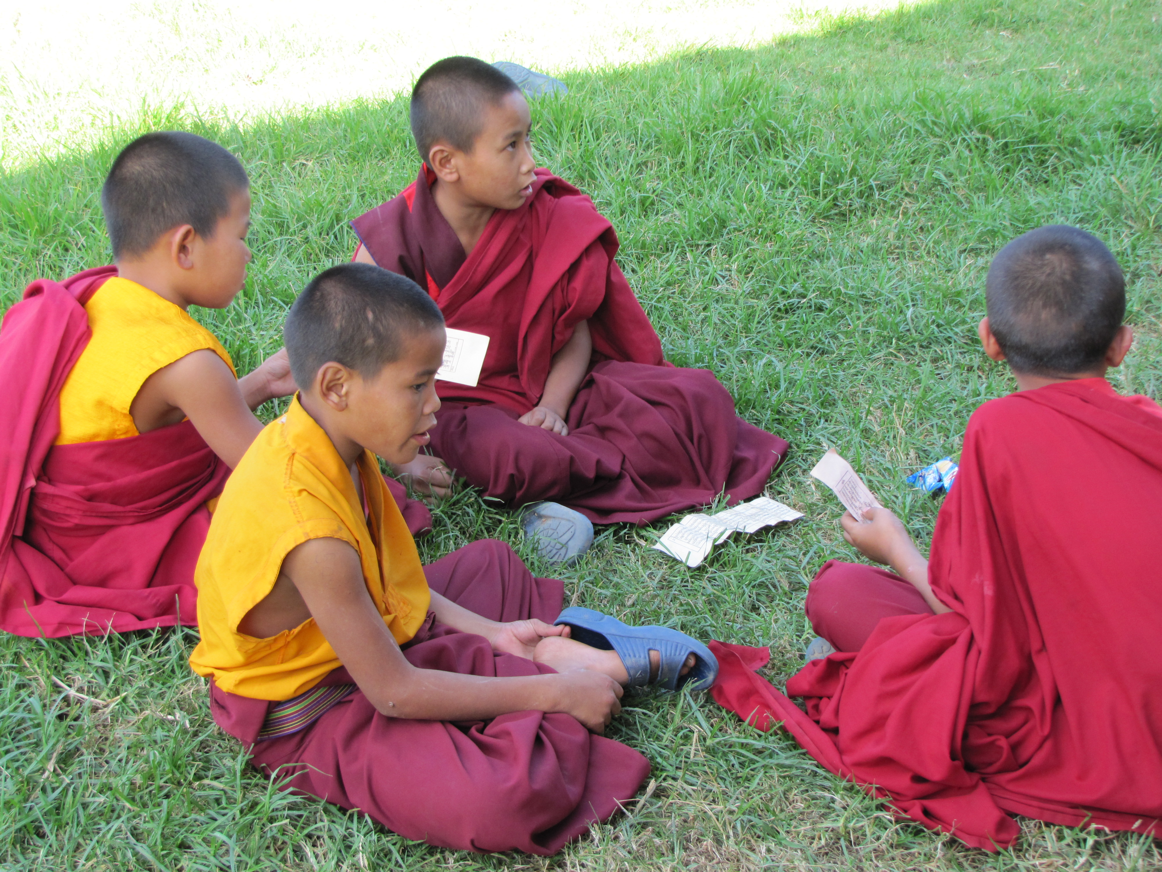 Bhutan View